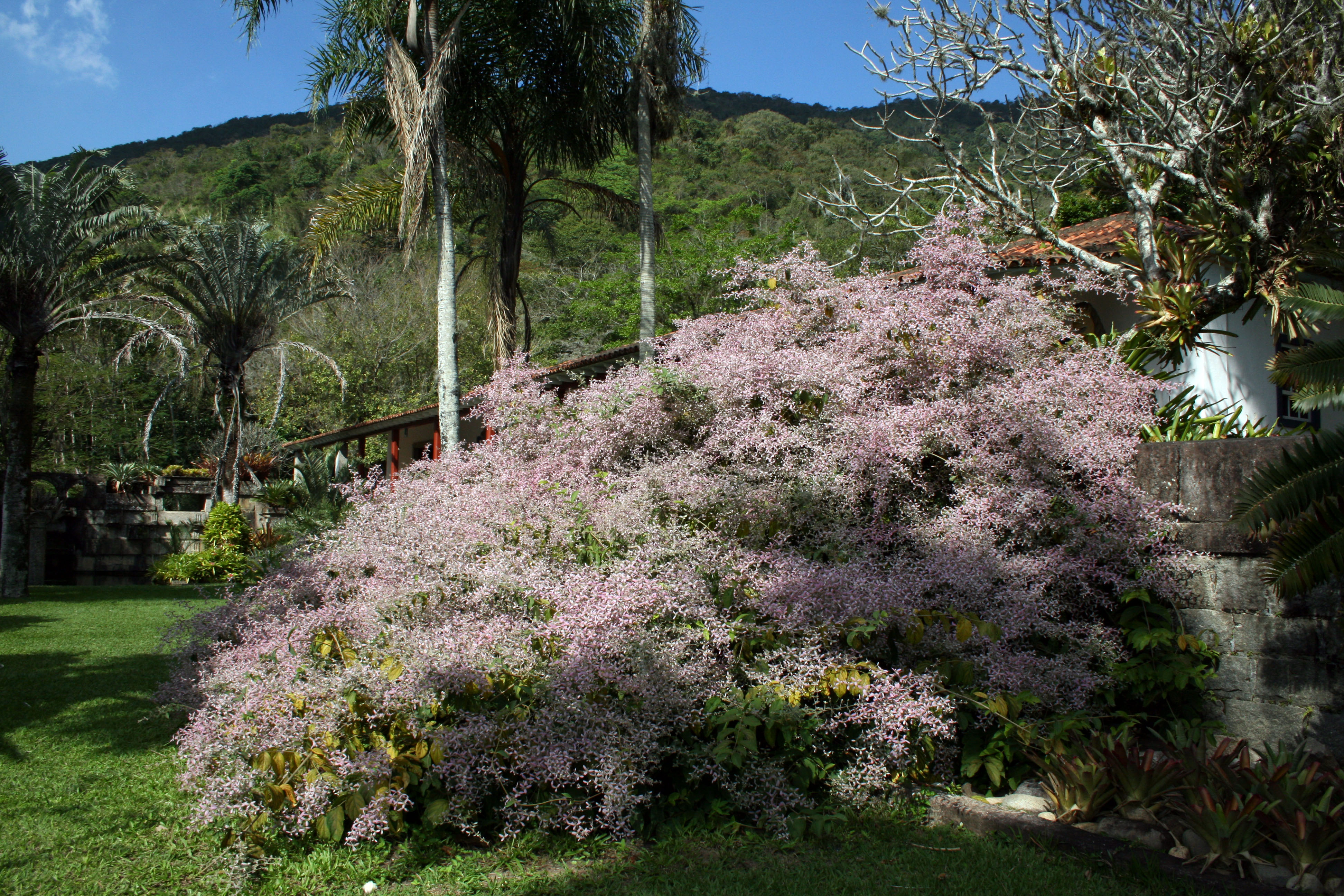 Sítio Roberto Burle Marx. Endereço: Estrada Roberto Burle Marx, nº 2019 - Barra de Guaratiba - RJ.